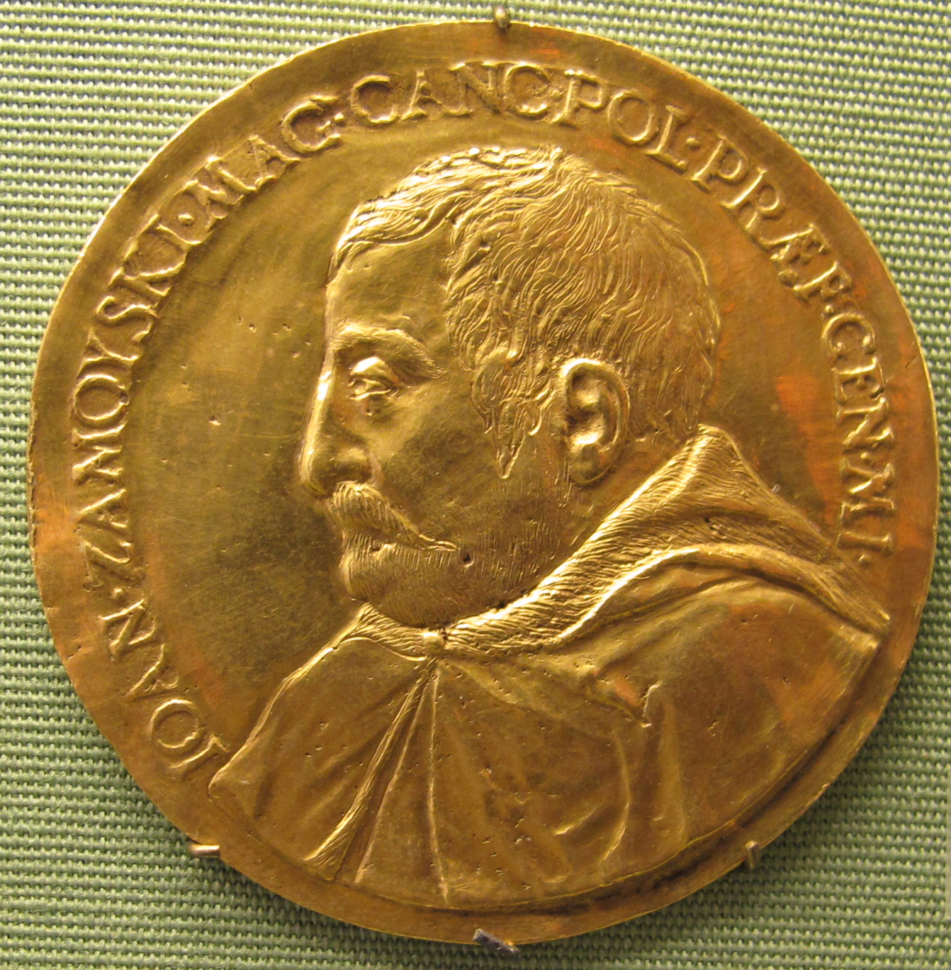 Ignoto, johann zamoyski, cancelliere di polonia, oro, 1598